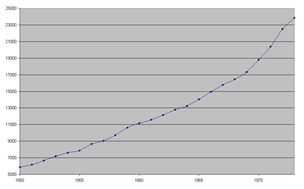 Eisenbahnstreckenkilometer im Gebiet des Deutschen Bundes 1850-1873 (Zahlen nach Hans-Ulrich Wehler, Gesellschaftsgeschichte, Bd.3, S.69f.